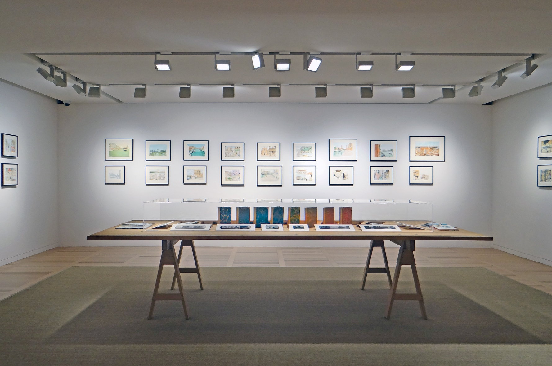 Les dessins originaux de Jirô Taniguchi pour le Travel Book Venise sont exposés au magasin Louis Vuitton de Venise jusqu'au 18 novembre 2014. Les clichés sur Venise du photographe, couturier, peintre et designer Mariano Fortuny (1871–1949) sont confrontés aux dessins de Taniguchi.